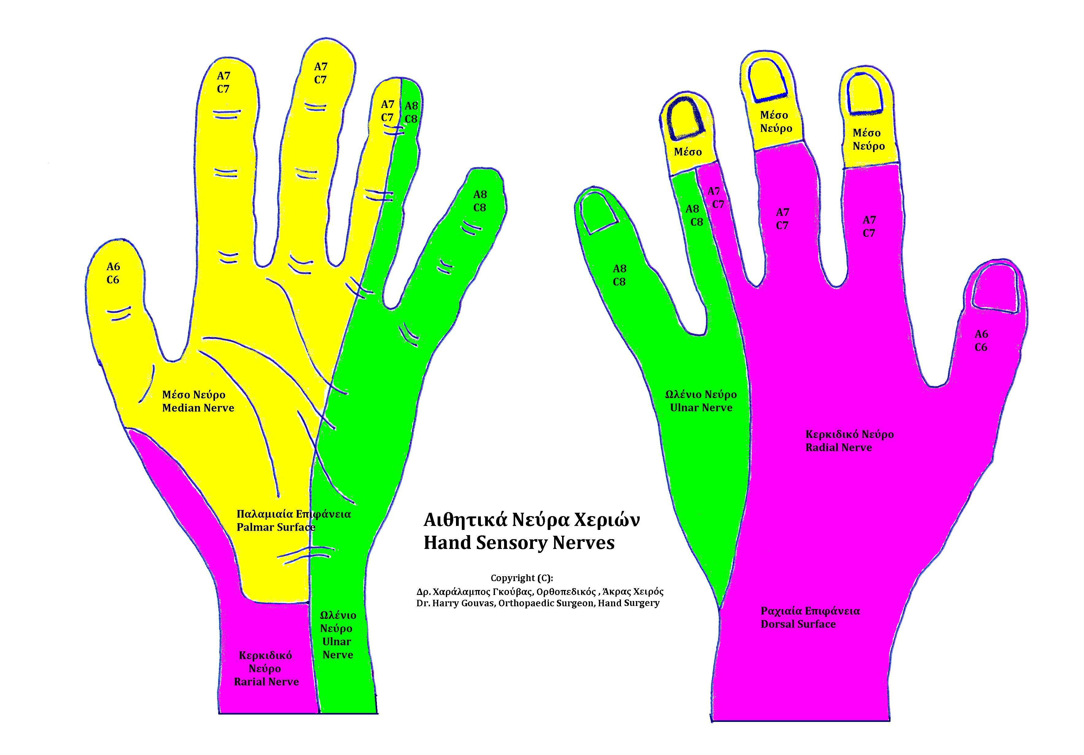 Αισθητικά Νεύρα του Χεριού